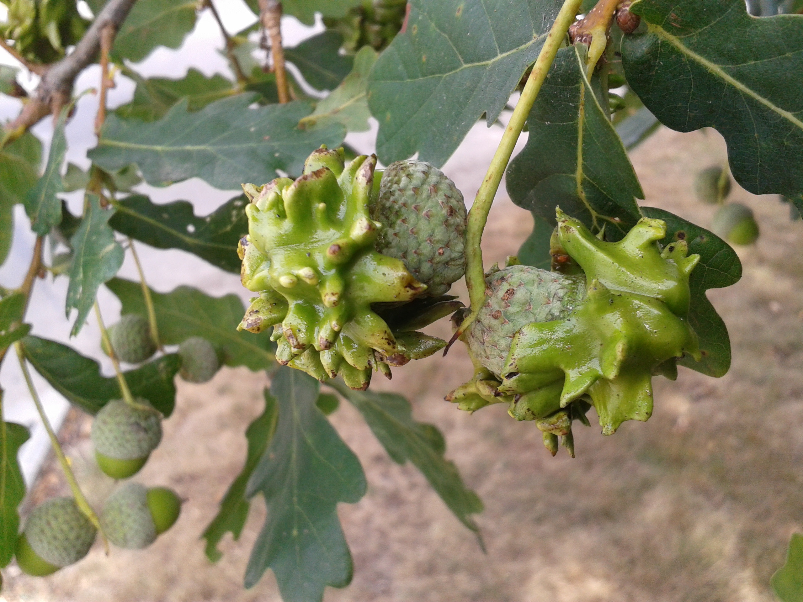 Glands déformés